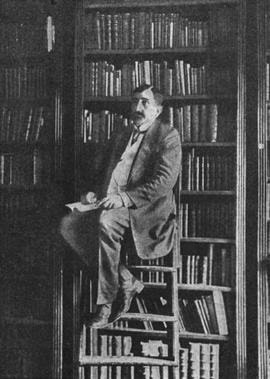 Лев Аристидович Кассо, министр народного просвещения, в своей библиотеке.